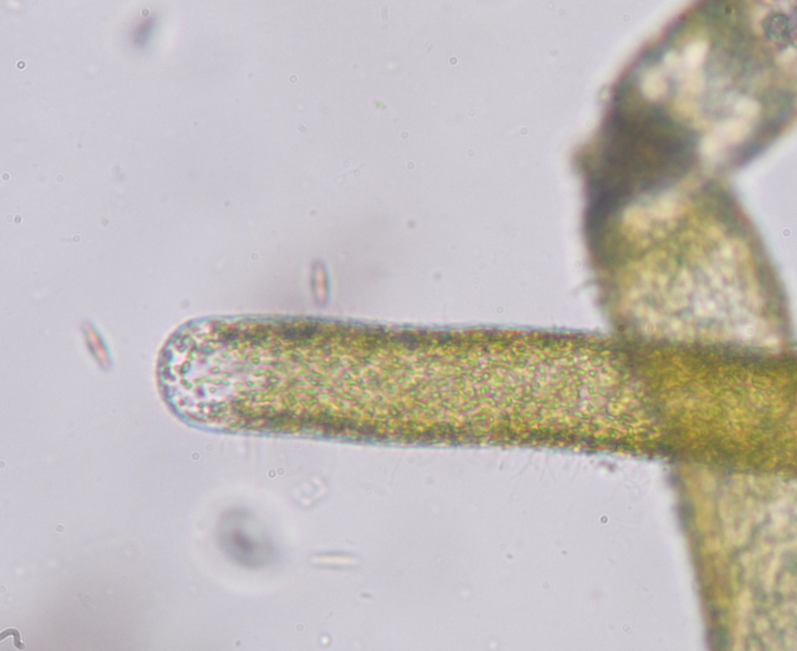 Vaucheria sp：フシナシミドロ 2015/01/10 水田にて採集：from water rice field 和歌山県田辺市：Tanabe City. Wakayama Pref. Japan